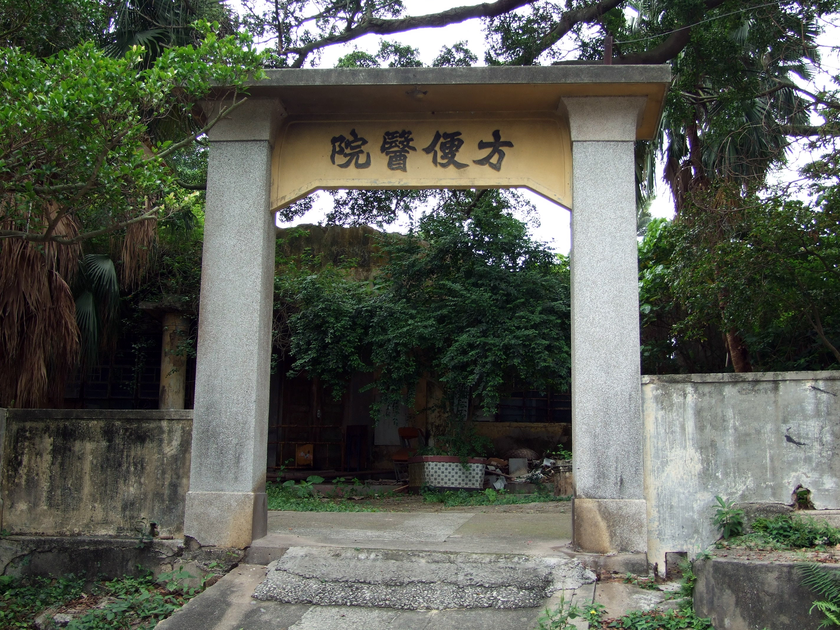 長洲方便醫院